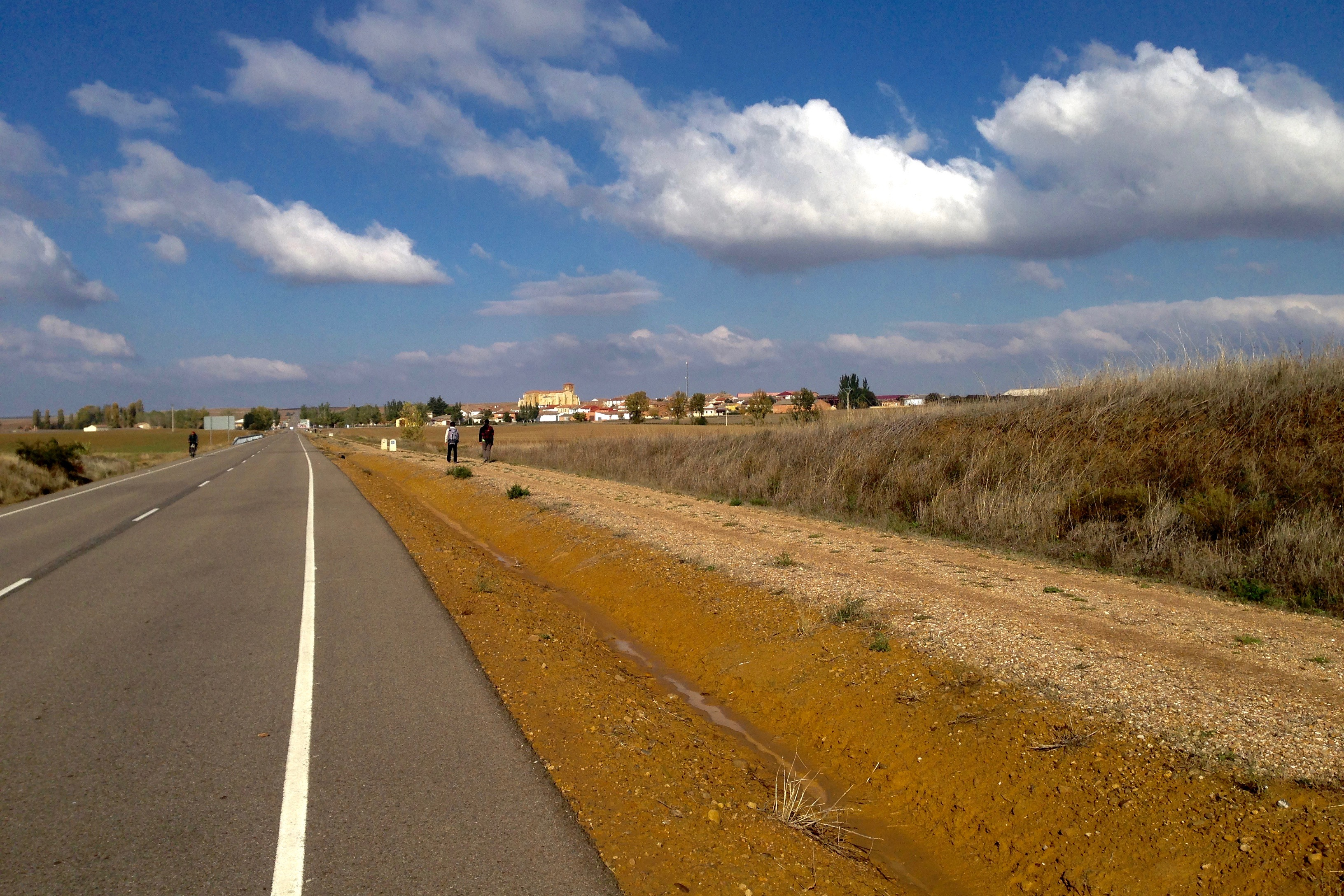 Caminostrada biegnąca poboczem drogi P-980 nieopodal miejscowości Villalcázar de Sirga, Kastylia-León, Hiszpania